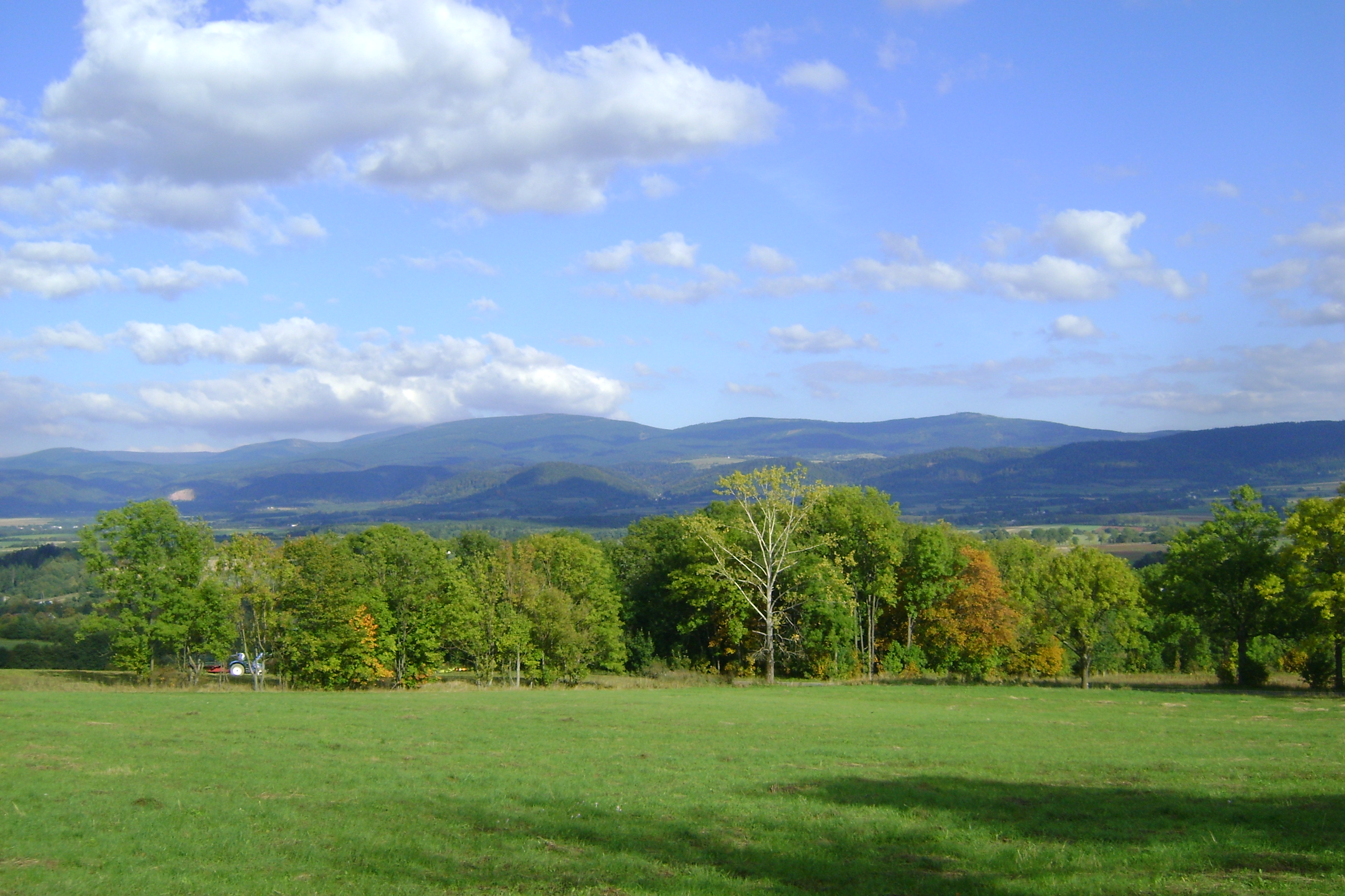 Pasmo górskie w południowo-zachodniej Polsce i północnej części Czech